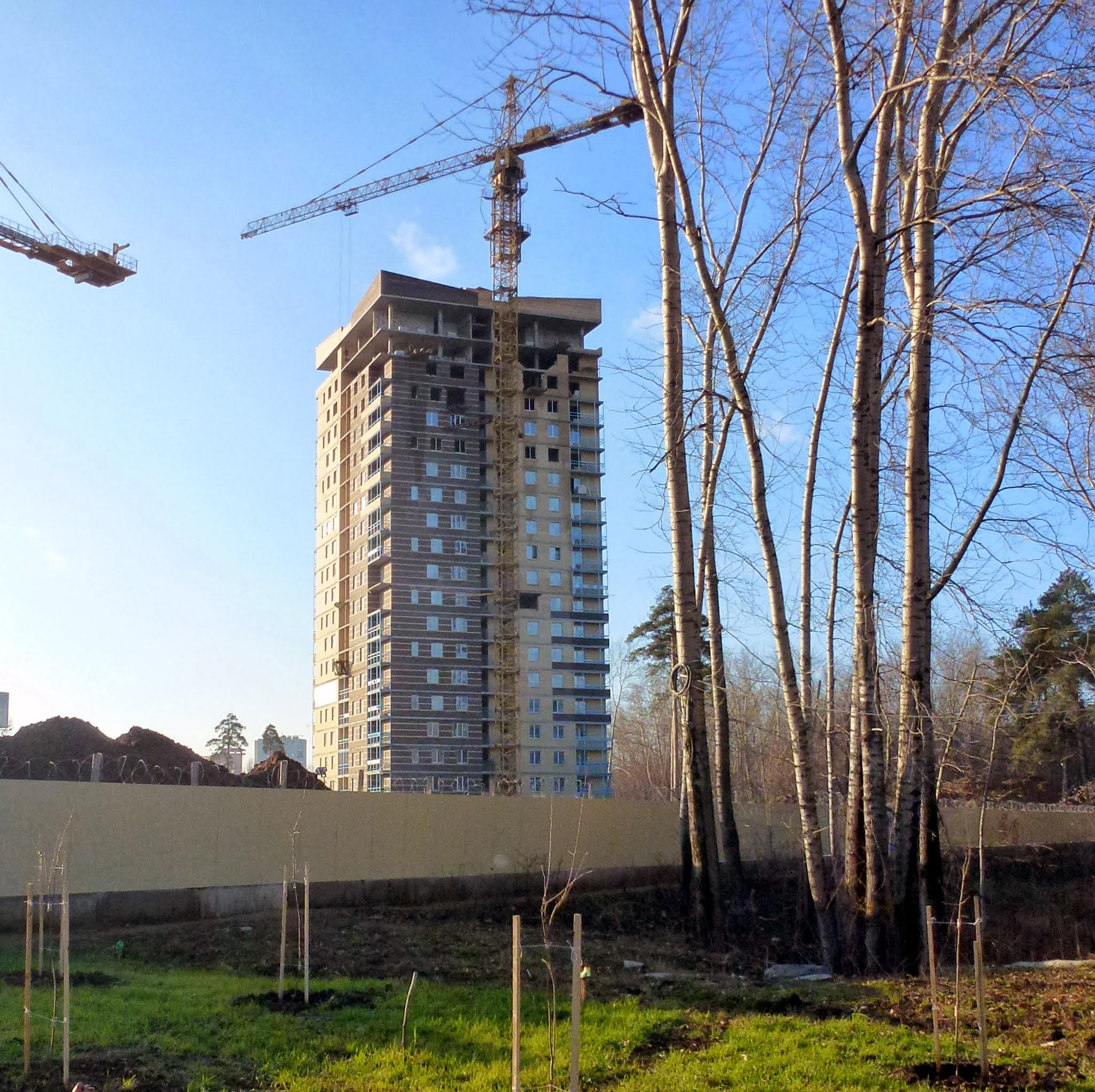 Жилой комплекс "Галактика", Пермь